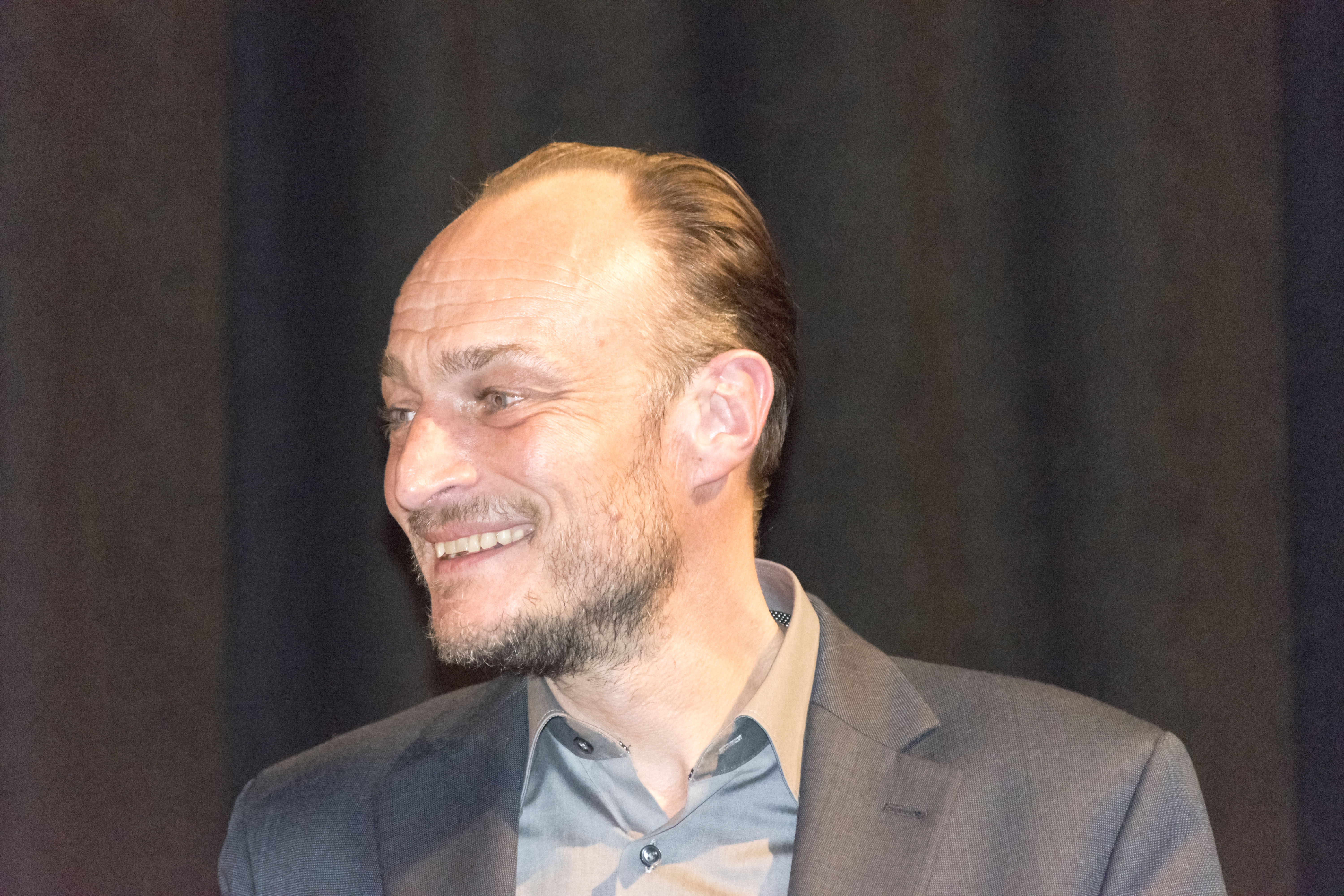 Fotky z novinářské projekce 18. 4. 2018 Autor: Blanka Borová (Karolína Černá) pro Kritiky.cz